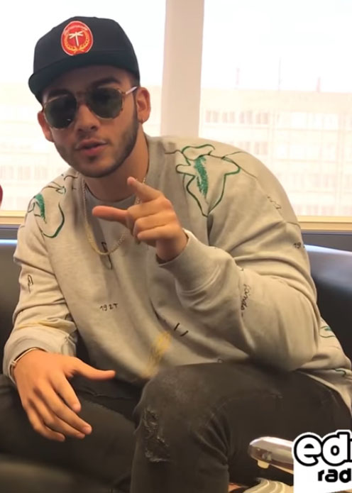 Manuel Turizo durante una entrevista